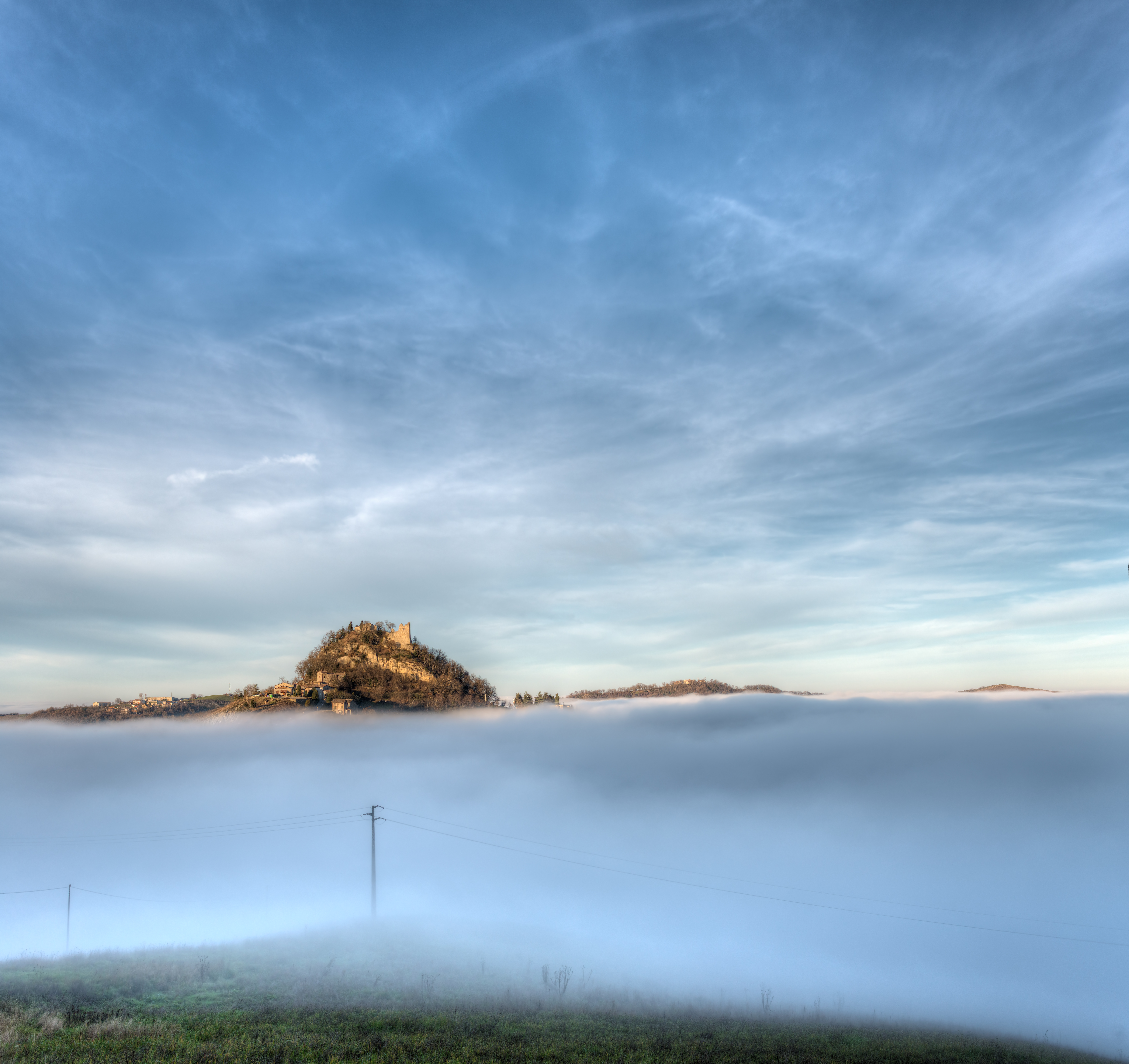 Castello di Canossa tra le nuvole - Canossa, Reggio Emilia, Italia